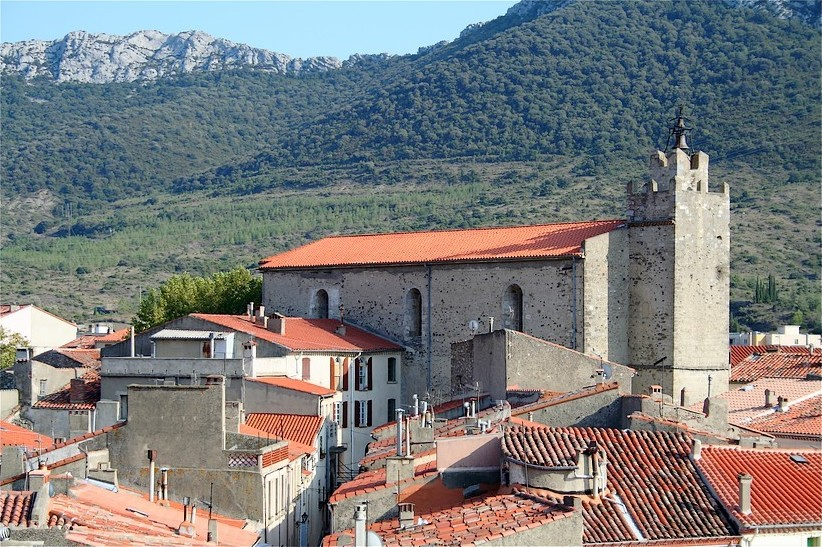 L'église, dont les origines remontent au XIe siècle, doit son aspect actuel à sa reconstruction au début du XIVe.